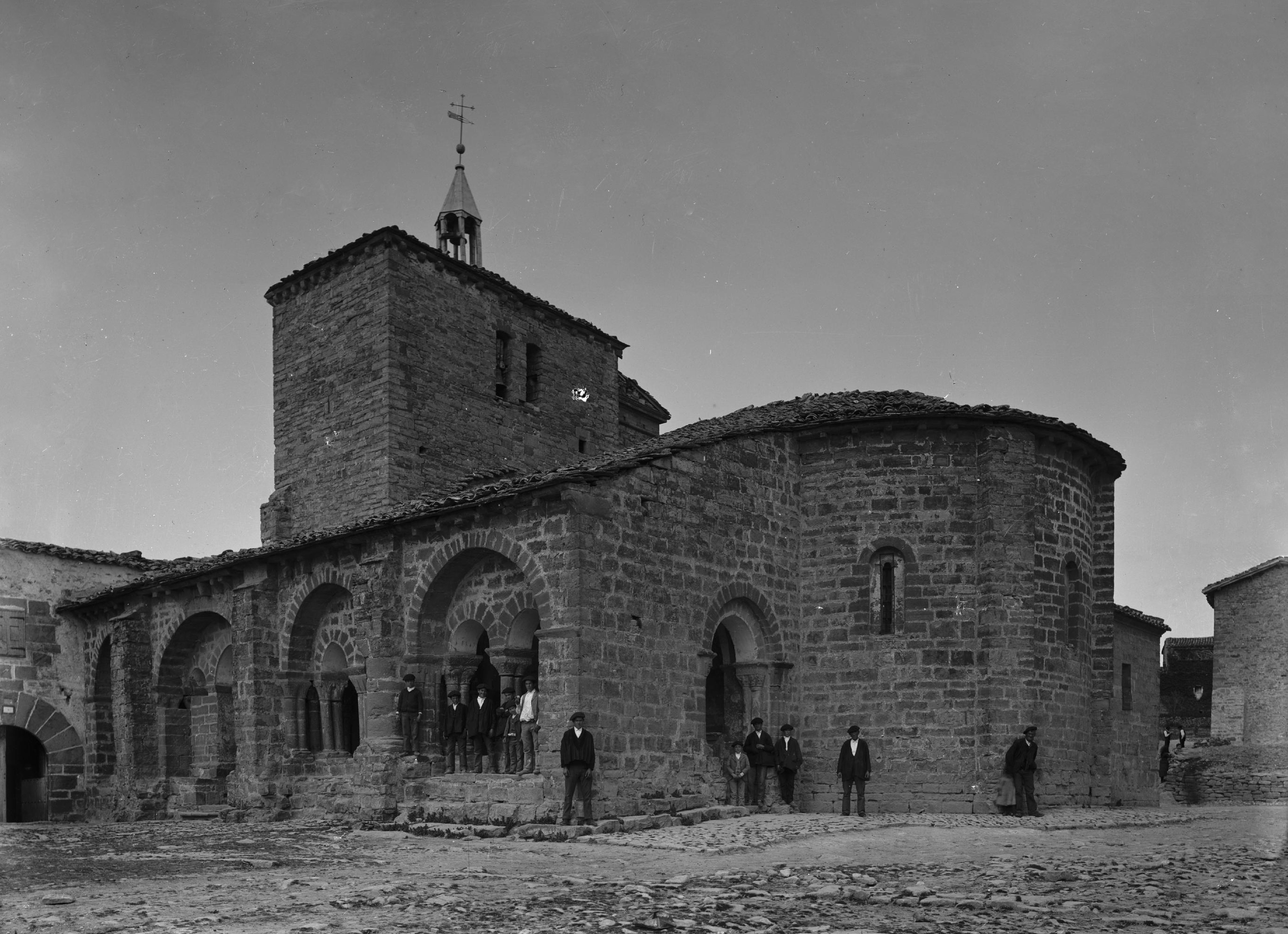 Iglesia de Nuestra Señora de la Purificación de Gazólaz, en la revista española La Hormiga de Oro.